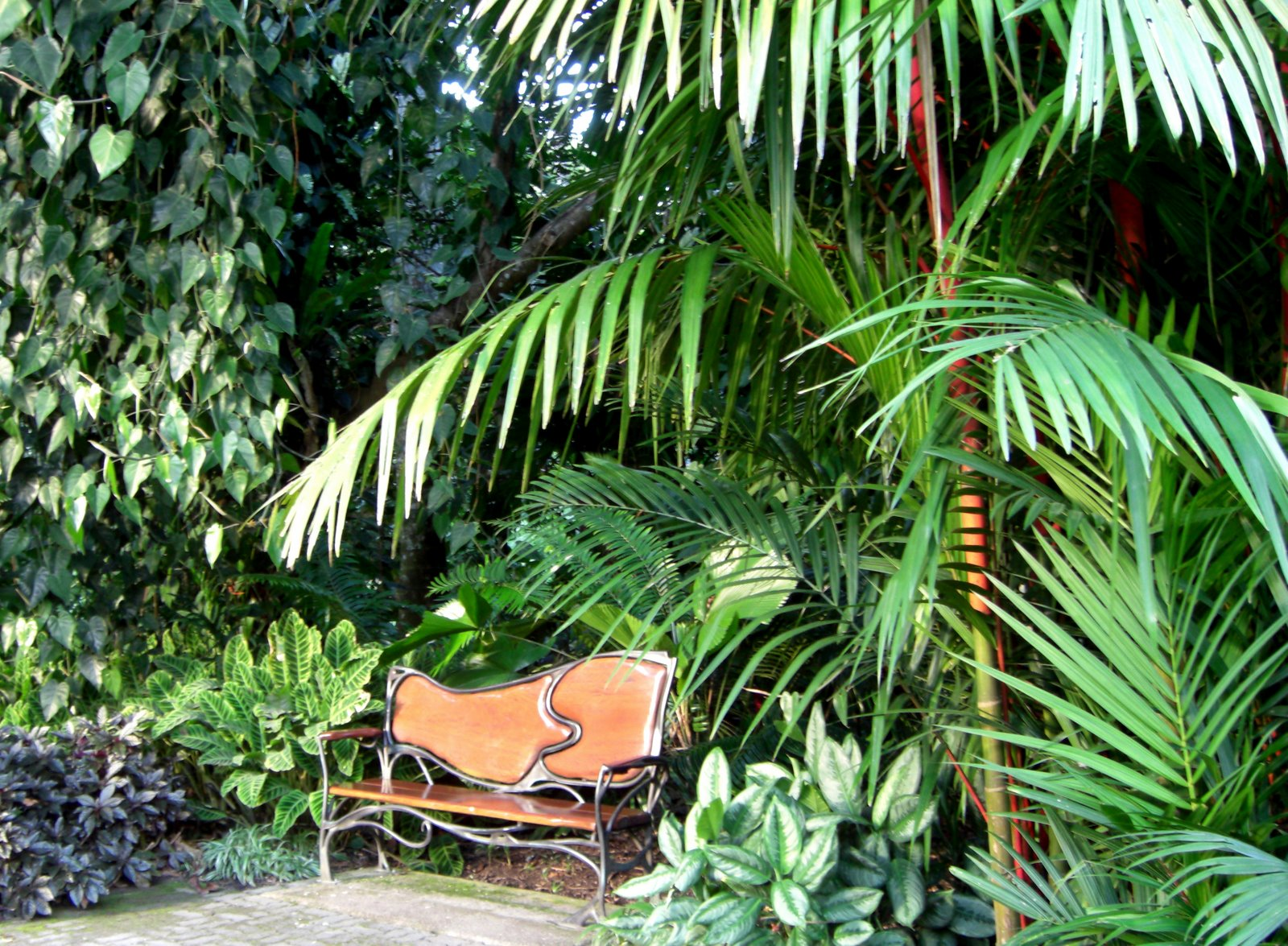 Plante du jardin botanique de Cairns